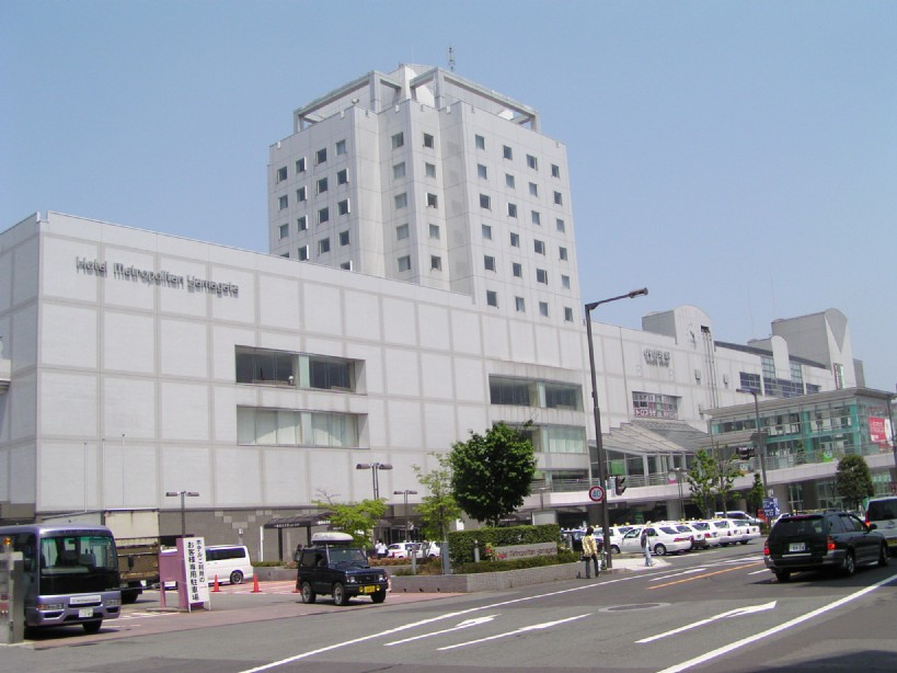 Yamagata Station in Yamagata Prefecture, Japan